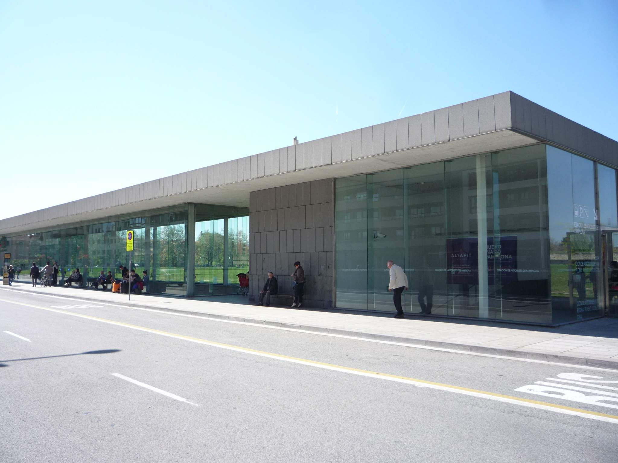 Pamplona - Estación de Autobuses